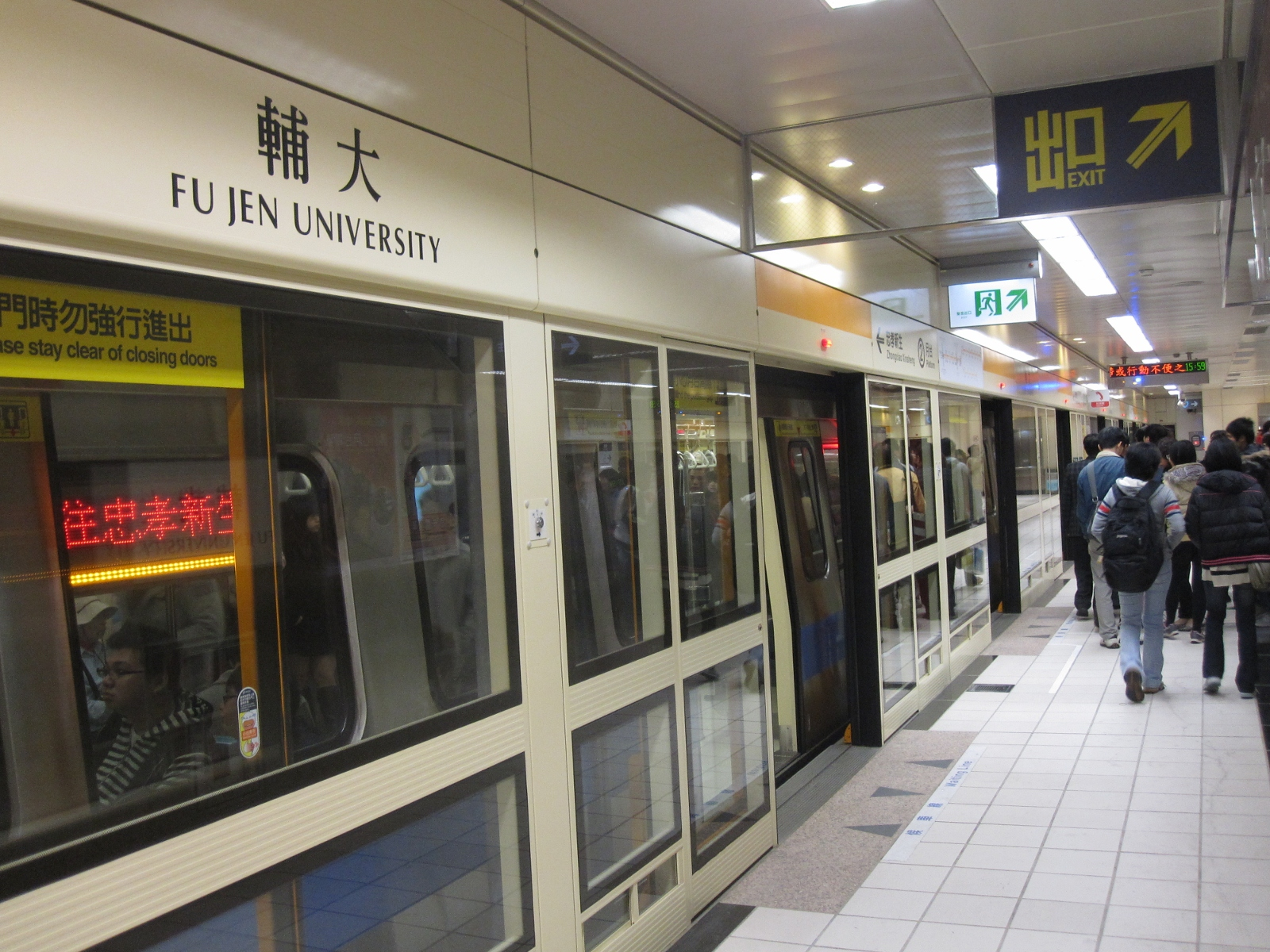 輔大站月台